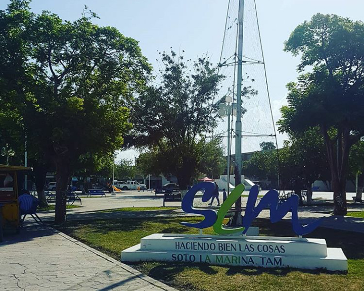 Parque en Soto la Marina, Tamaulipas.